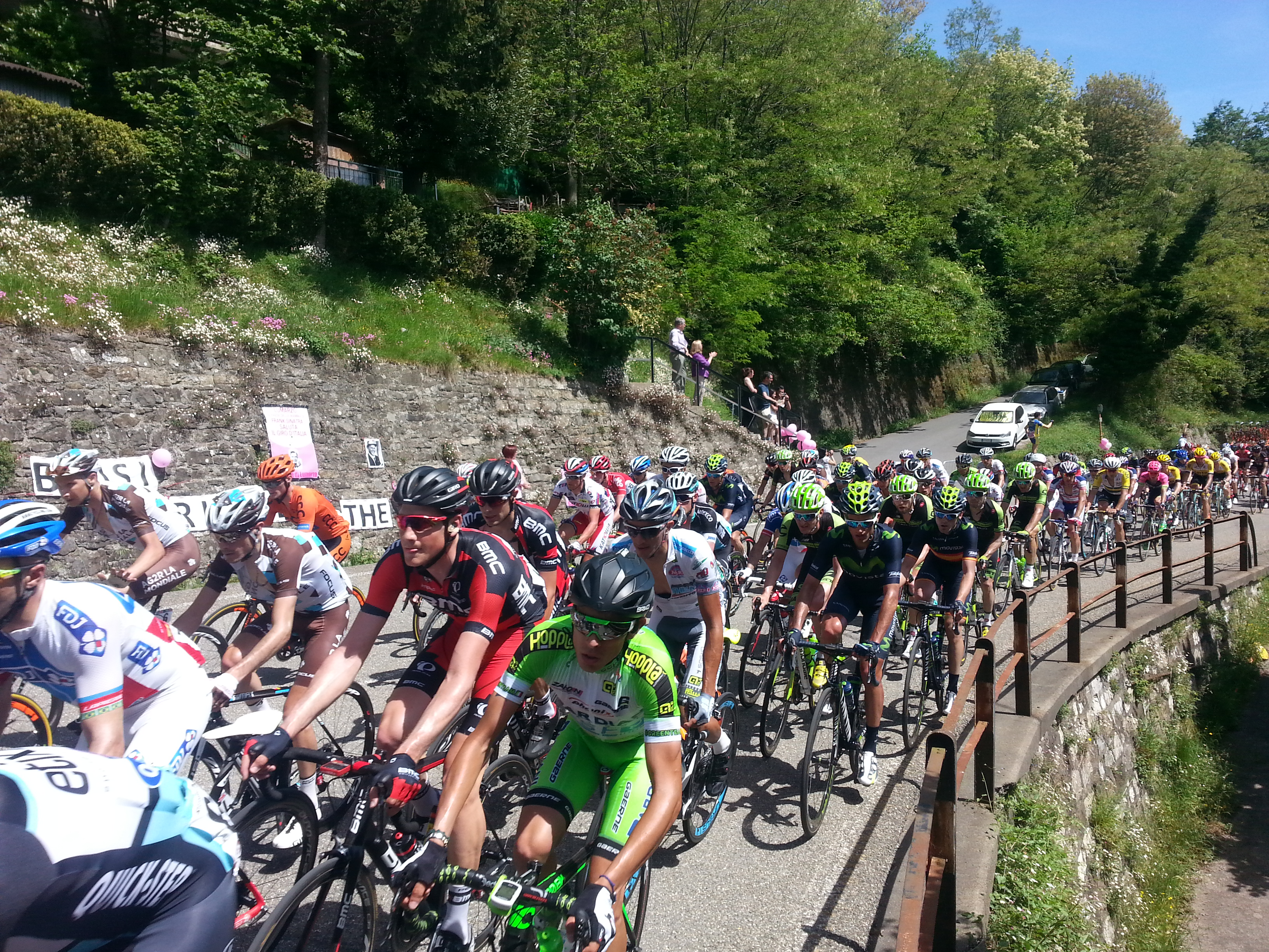 Giro d'Italia 2015 a Boasi